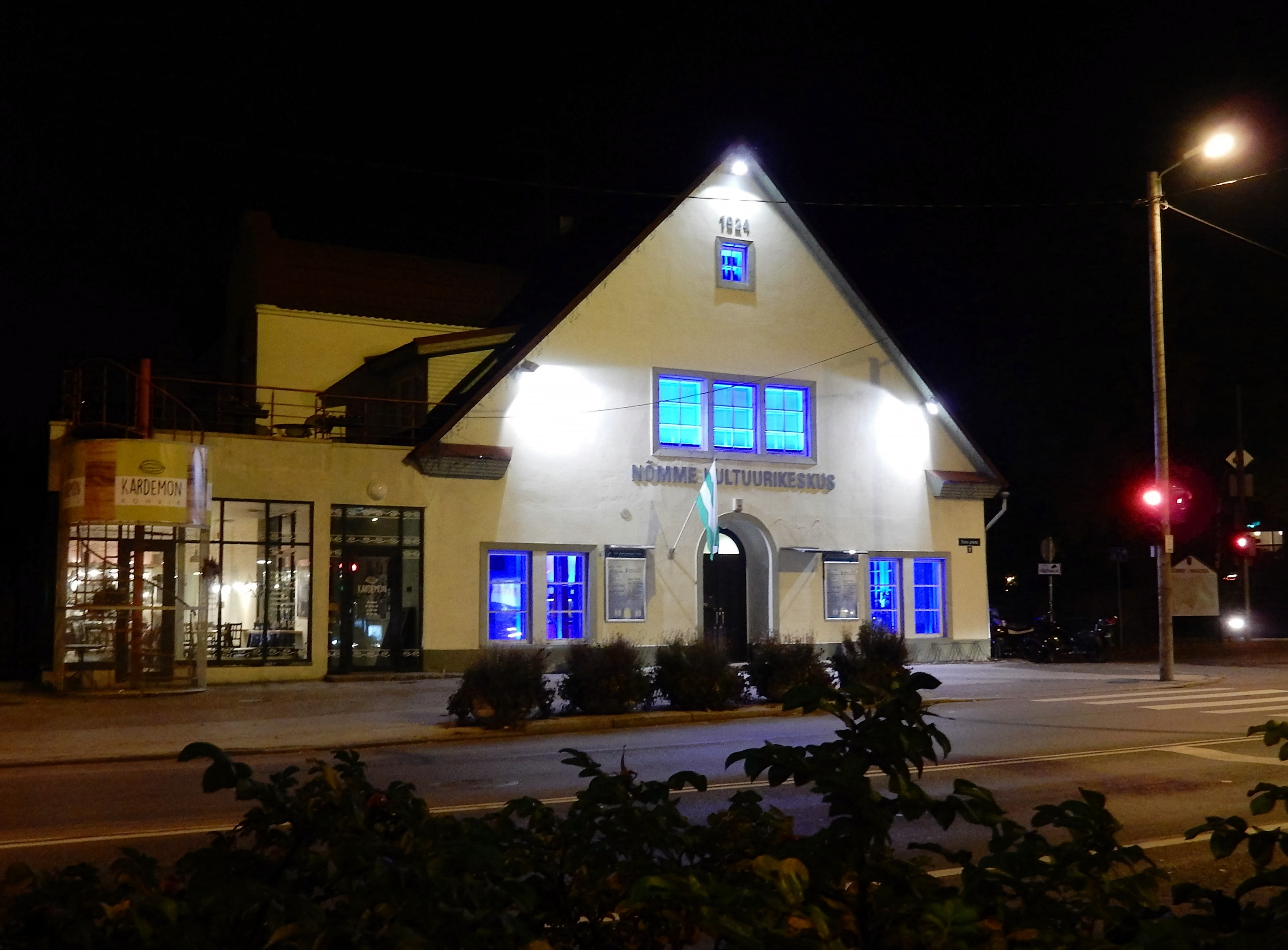 Nõmme Kultuurikeskus, Turu plats 2